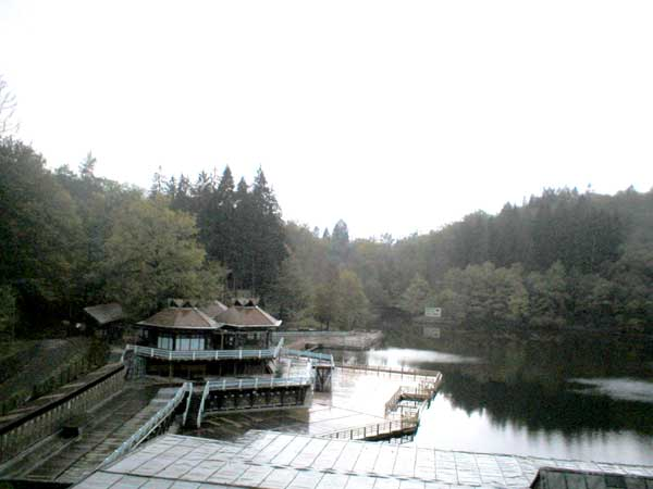 Szovátai Medve-tó